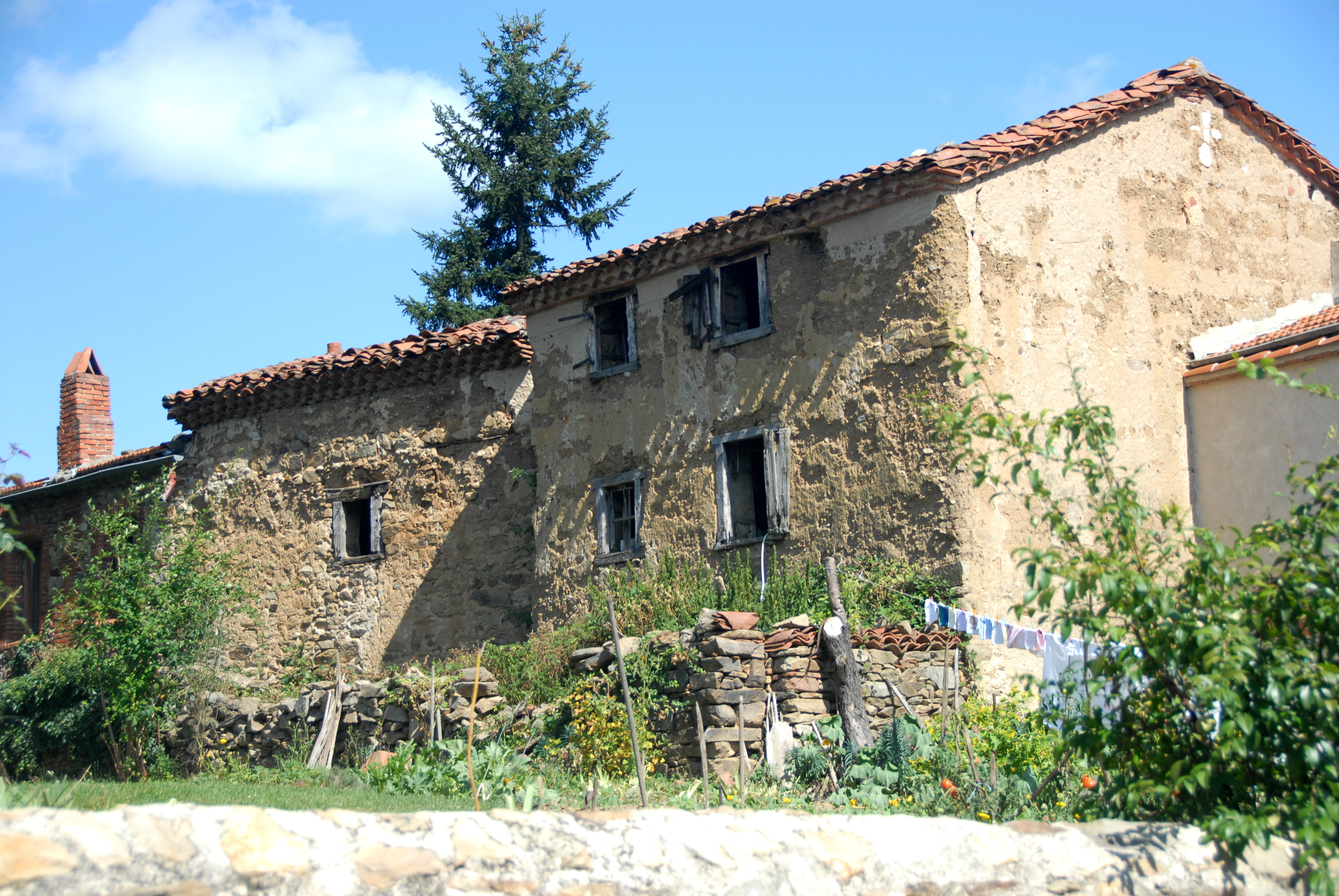 Lavaudieu, hier wohnt wohl keiner